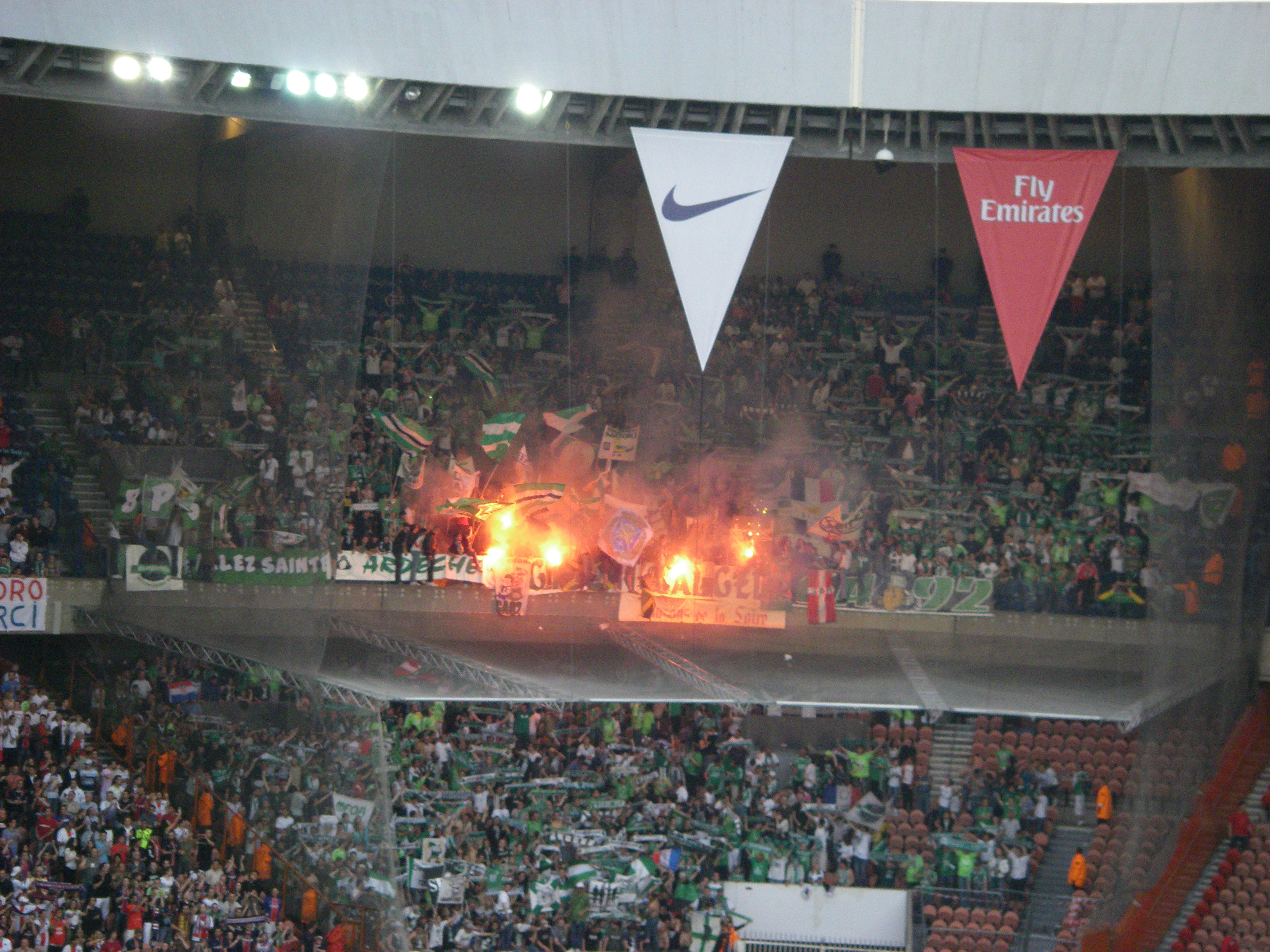 Fankurve des AS Saint-Étienne beim Gastspiel in Paris am 10. Mai 2008